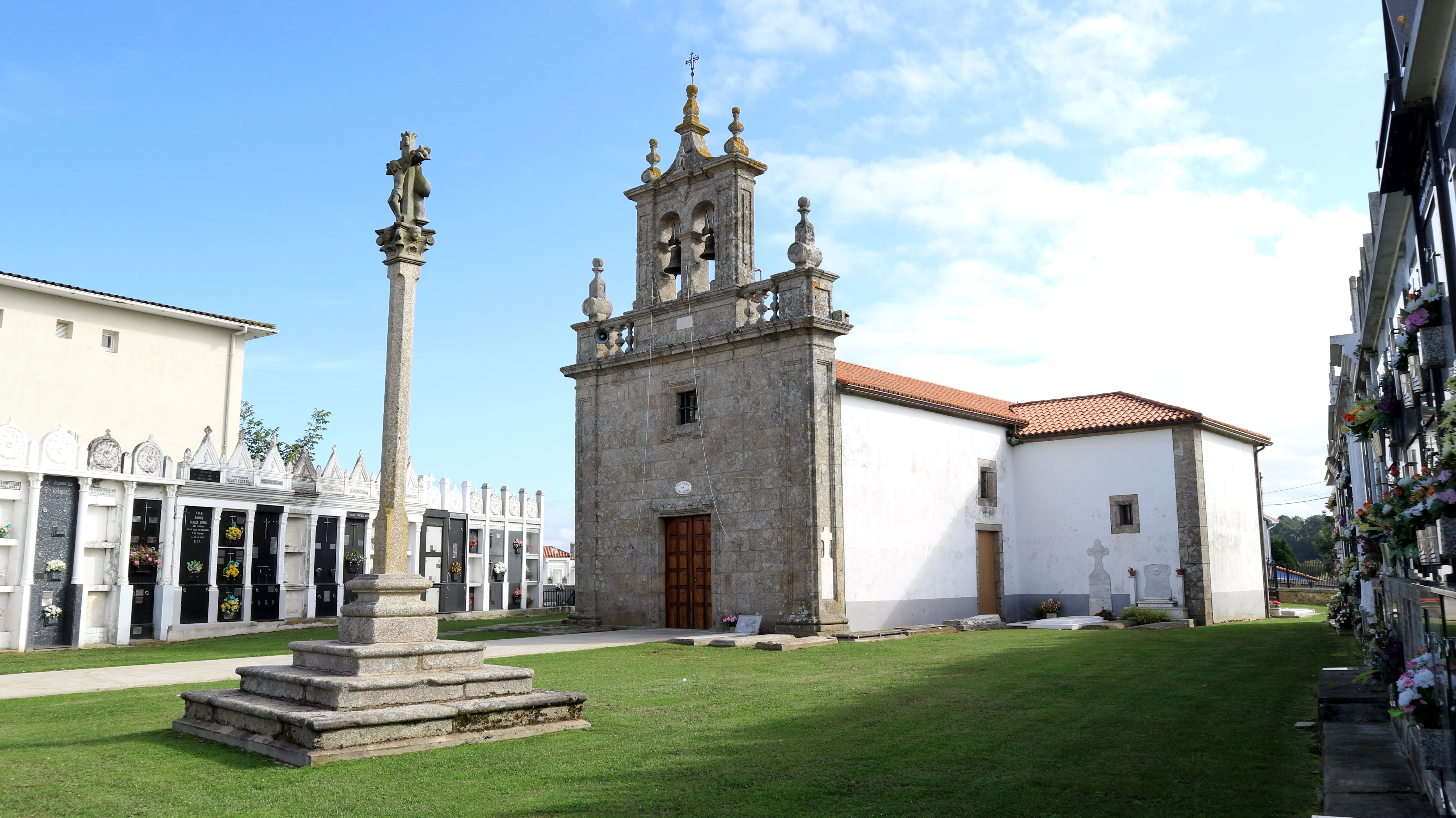 Igrexa e cruceiro de Santirso de Mabegondo. Na Igrexa, Mabegondo, Abegondo.